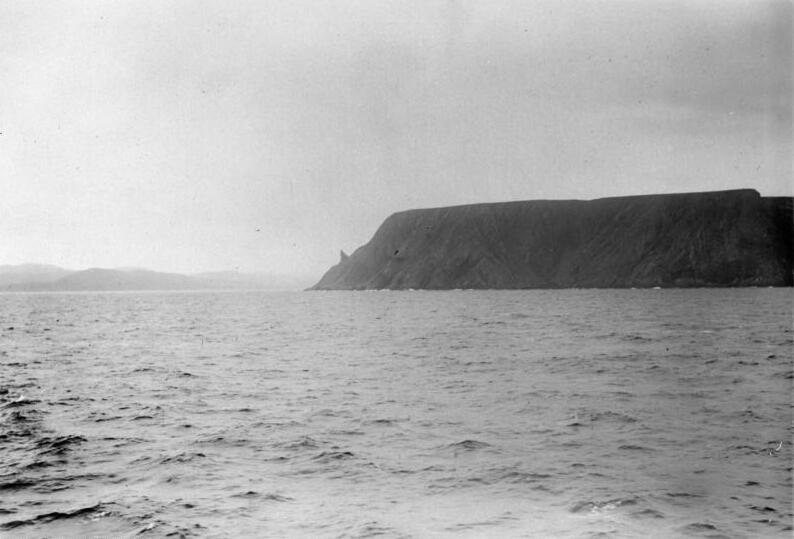 Polarfahrt mit dem Dampfer "München".- Nordkap 17. Juli - 12. August 1925